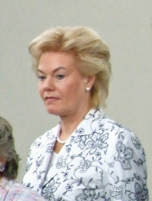 Erika Steinbach auf der Boernepreisverleihung 2007 in der Paulskirche in Ffm